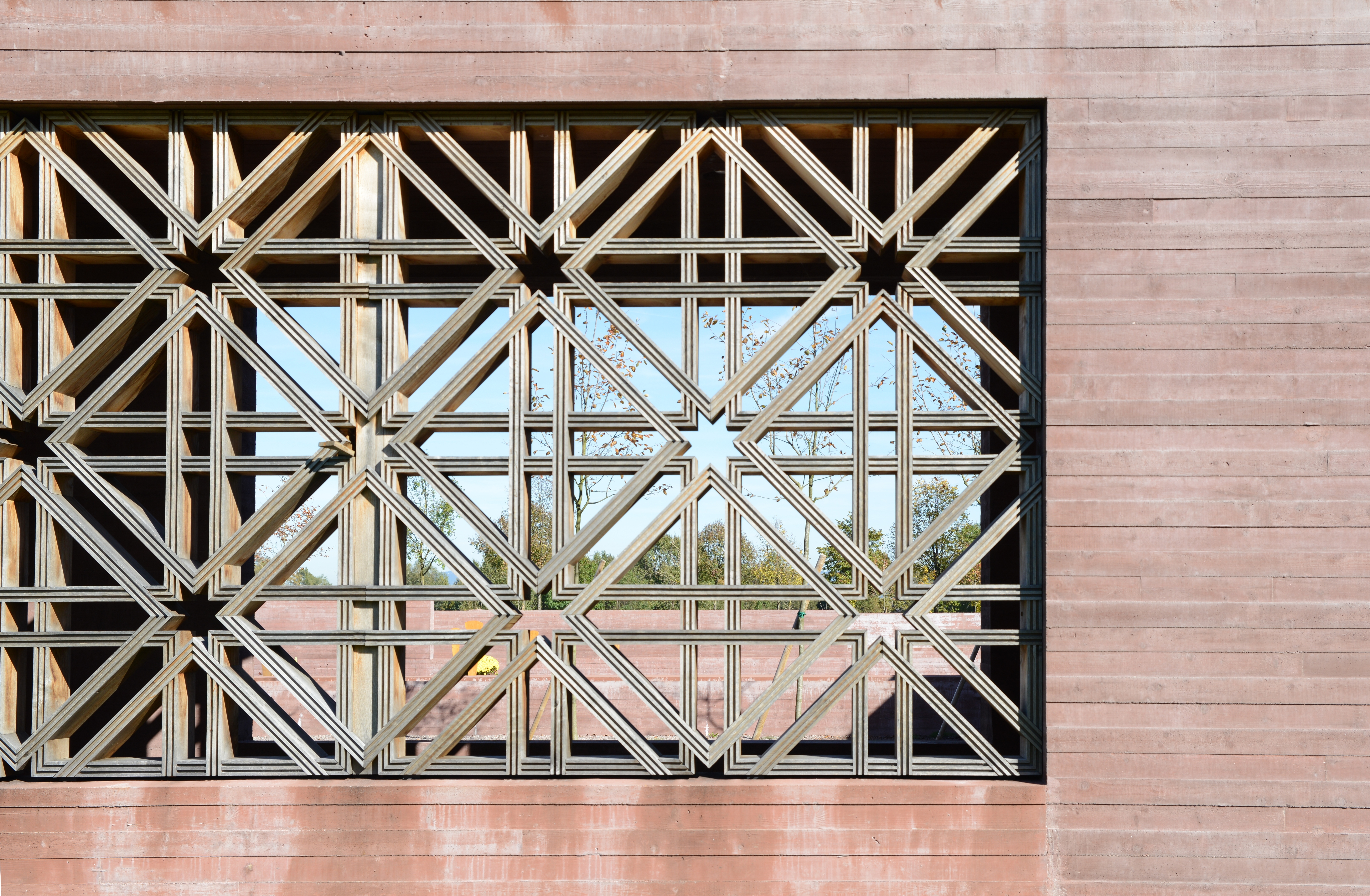 Muslimischer Friedhof an der Robert-Koch-Straße 18a, in Altach.